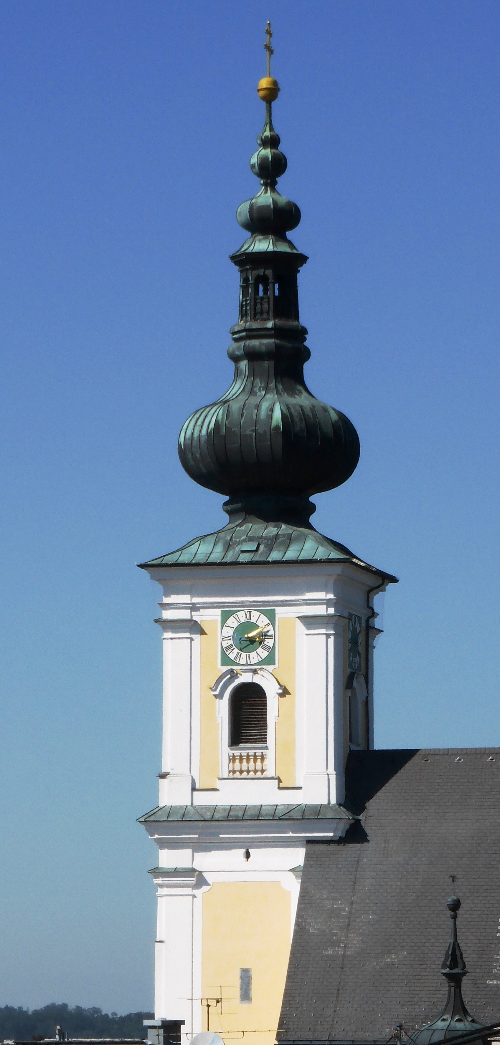 Turm aus dem Jahre 1700, der zwischen 1777 und 1786 umgestaltet wurde